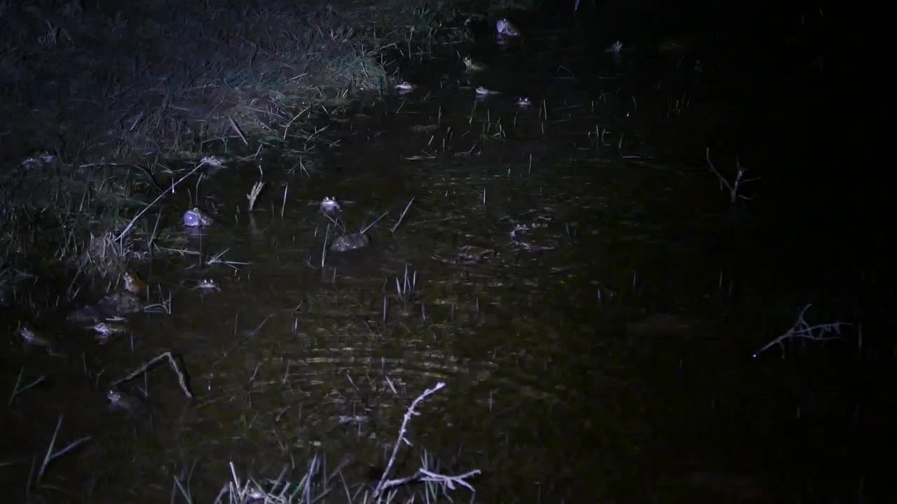 Lac des Rives, Les Rives, Hérault, FRANCE